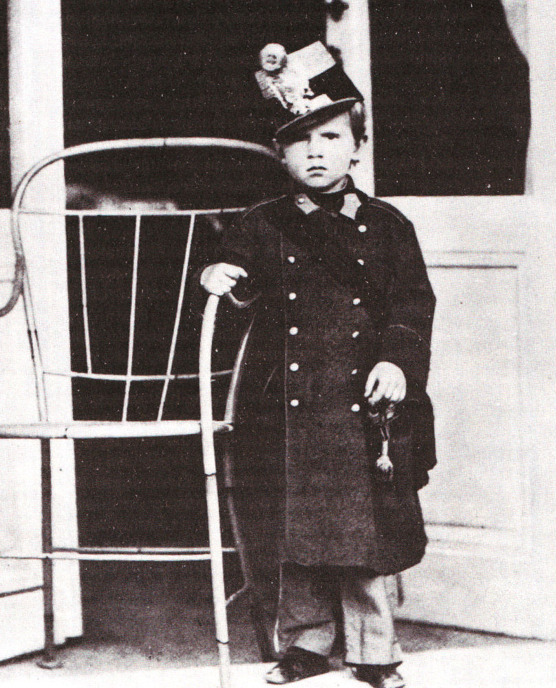 Rudolf von Österreich-Ungarn (1858 – 1889), Bildnis als Kind, 1862.[1]